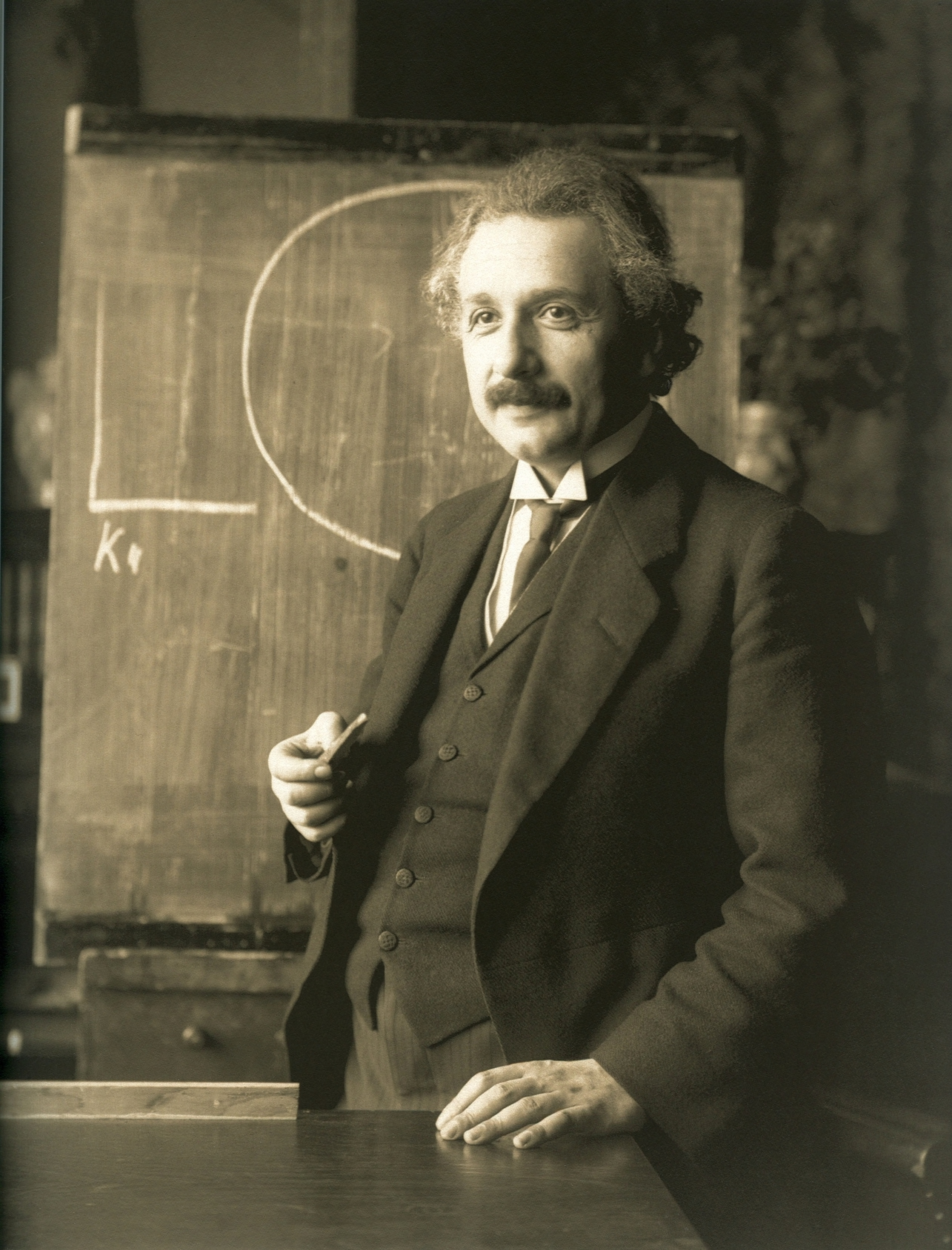 Albert Einstein during a lecture in Vienna in 1921